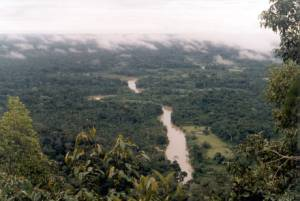 Rio Moa, Serra do Divisor National Park, western Brazil.